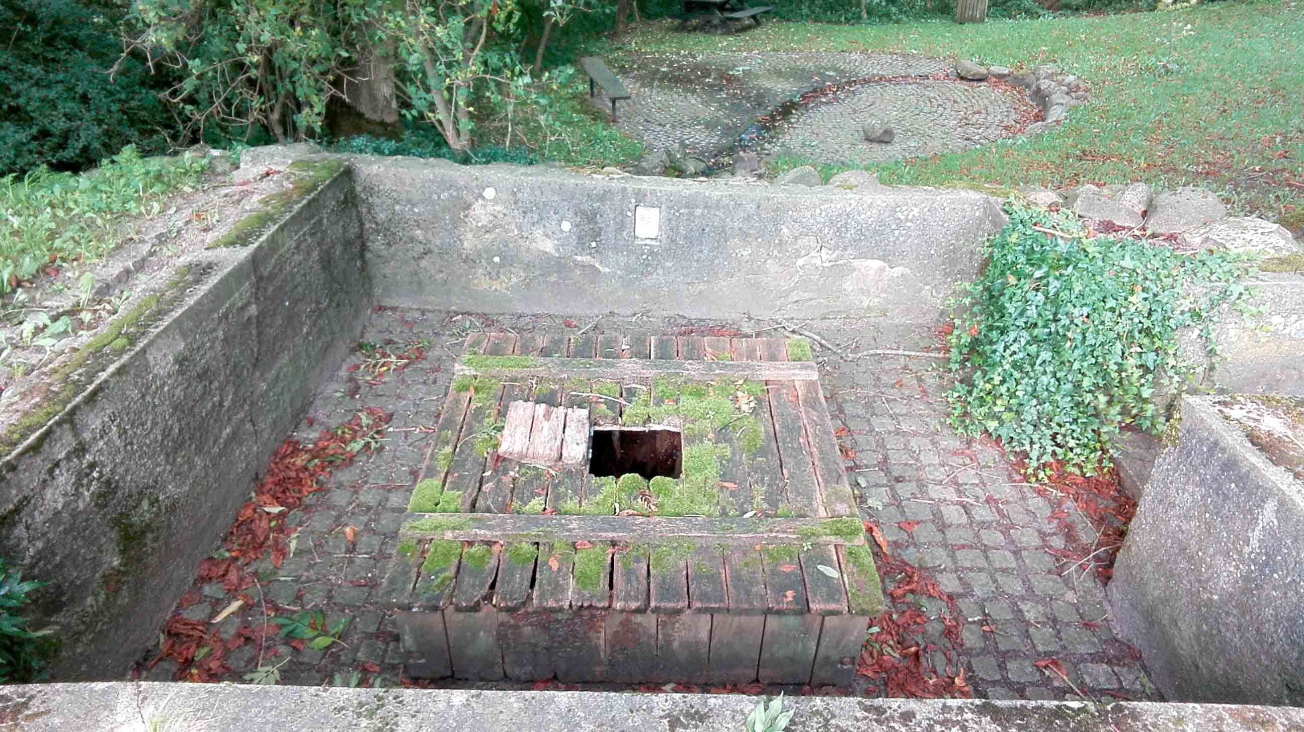 Regissekilde ved Frørup med liste over de lokale mænd, der restaurerede den i 1903